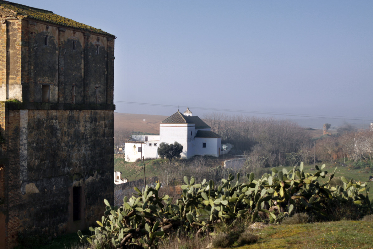 Vista de la Iglesia de San Juan Evangelista (al fondo) y antigua fortaleza (a la izquierda) de Gandul.